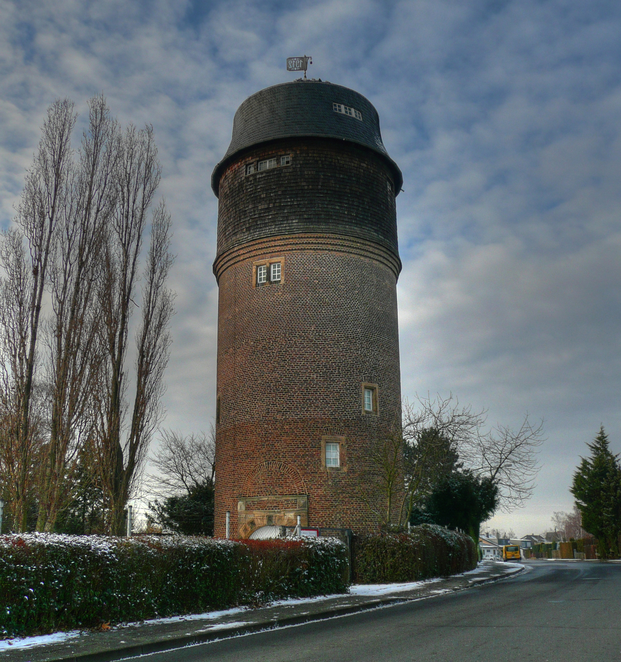 Ehemalige Merzenicher Windmühle)